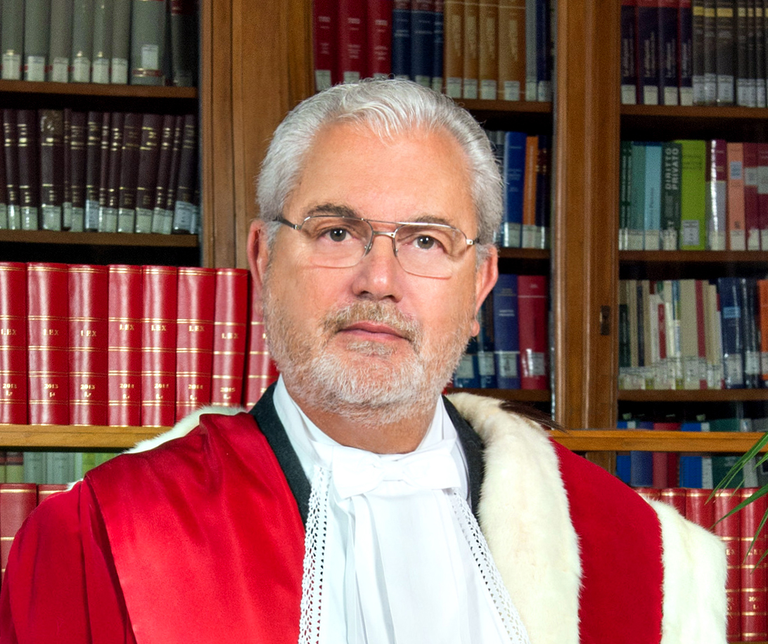 Maurizio Block, Inaugurazione anno giudiziario 2018